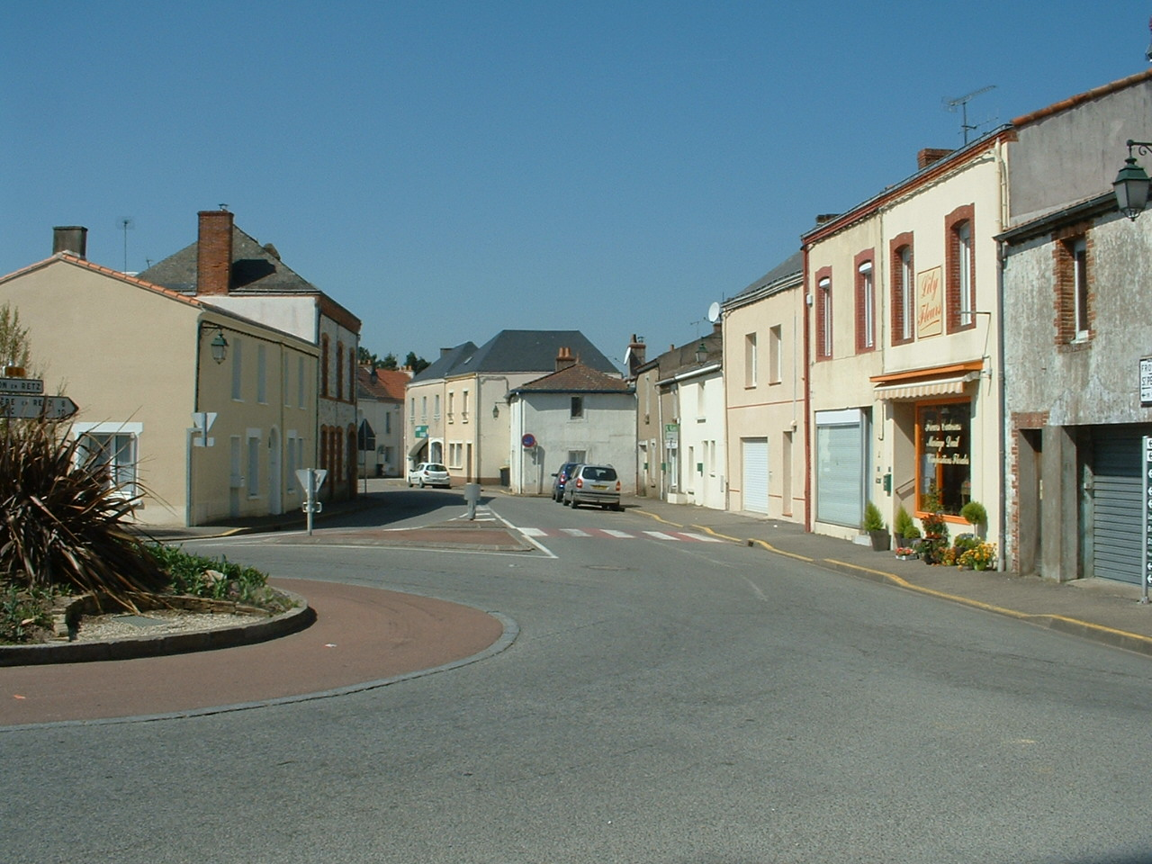 Chauvé (France) - Habitat du bourg